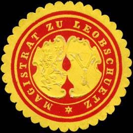 Sealing stamp Title: Magistrat zu Leobschuetz Description: rot, weiß, geprägt Place: Leobschütz size: 4 cm